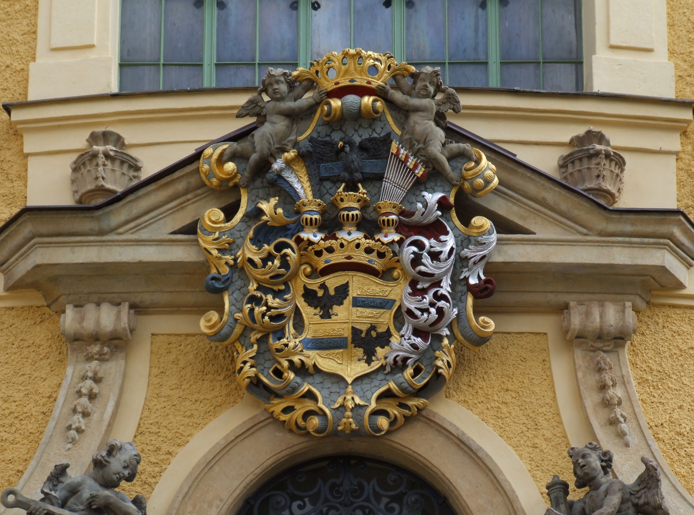 Erb na kostele v Hejnicich